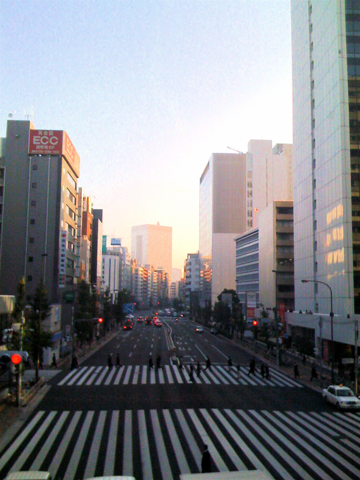 田町駅前